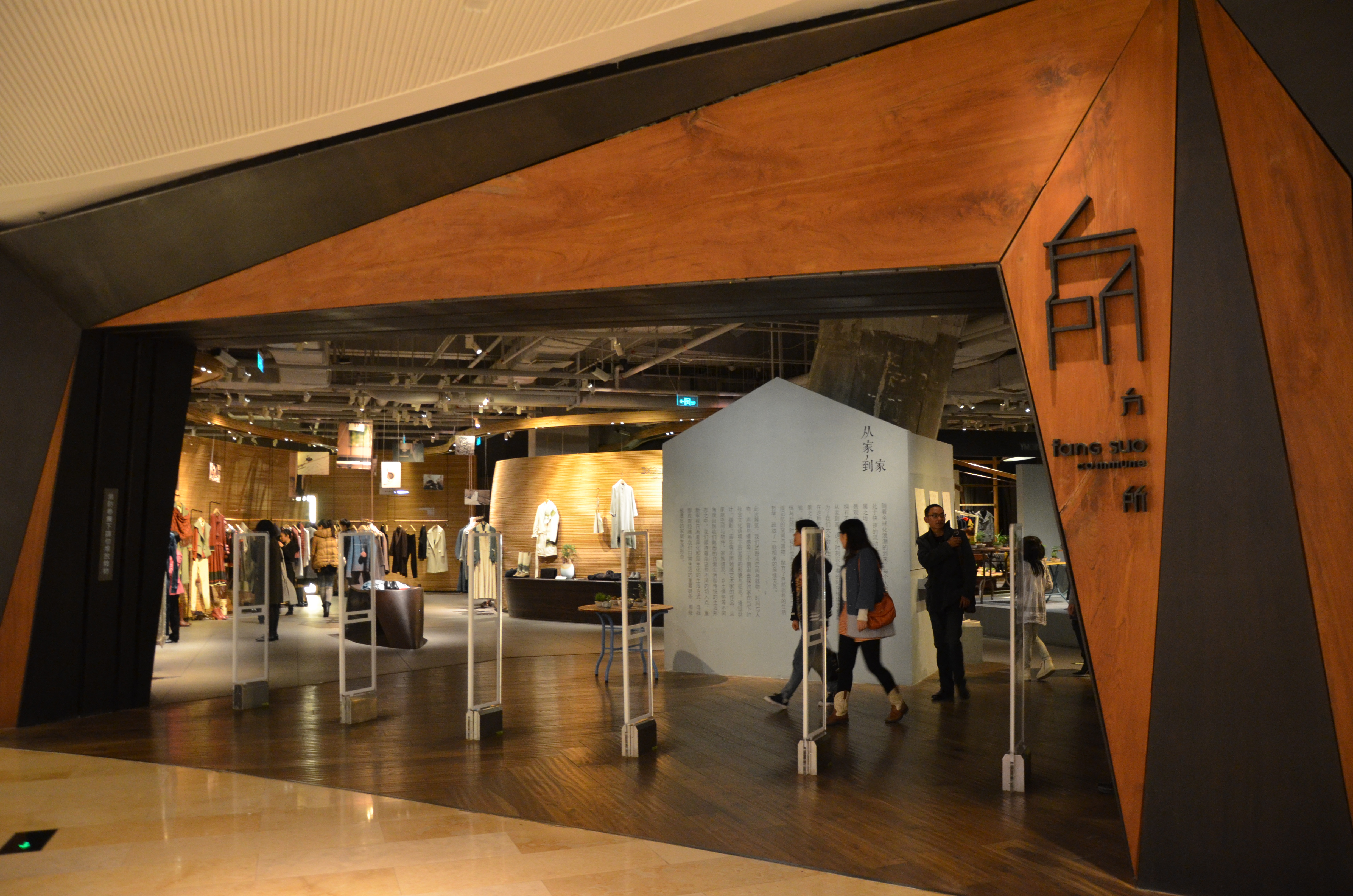 方所書店門口